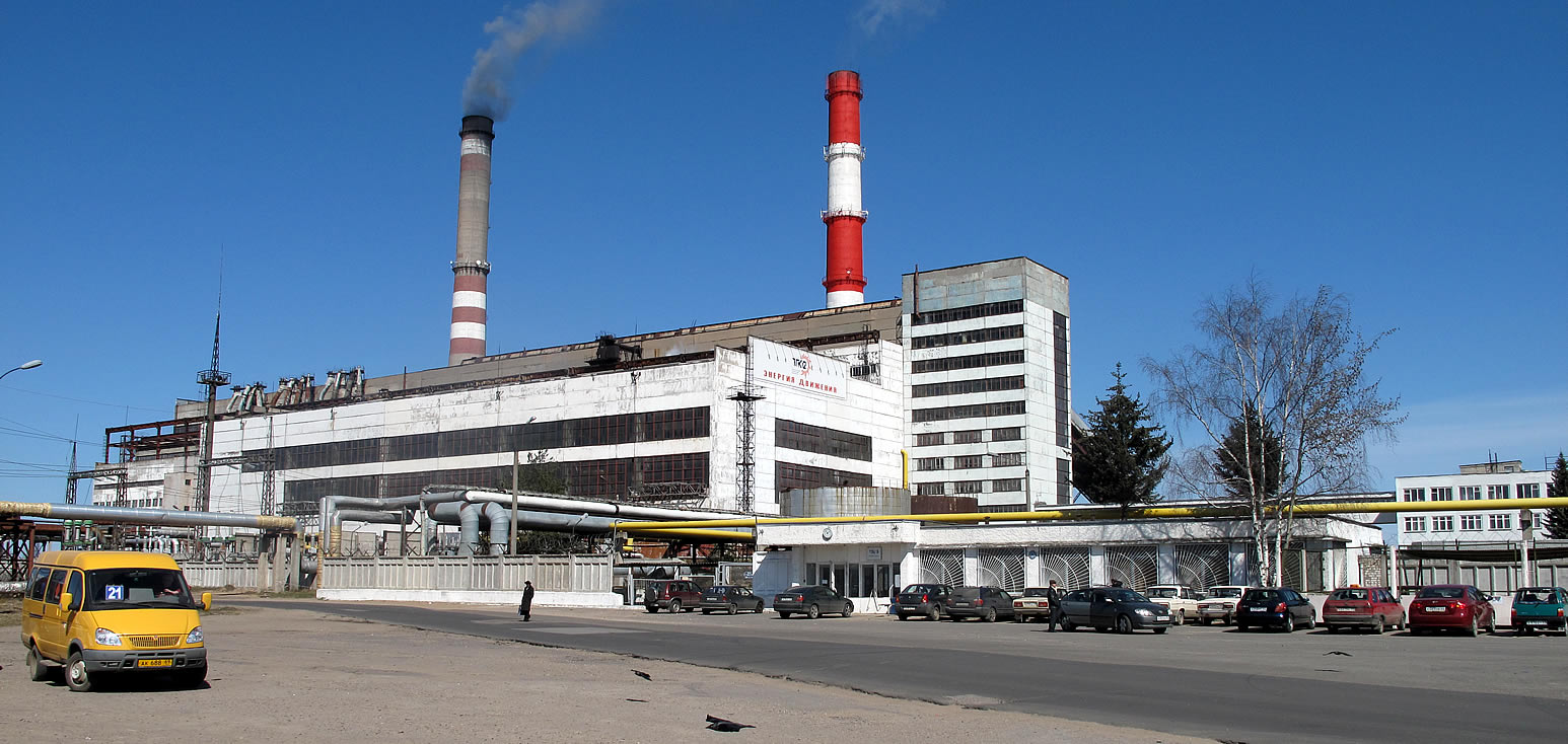 ТЭЦ-3, г. Тверь